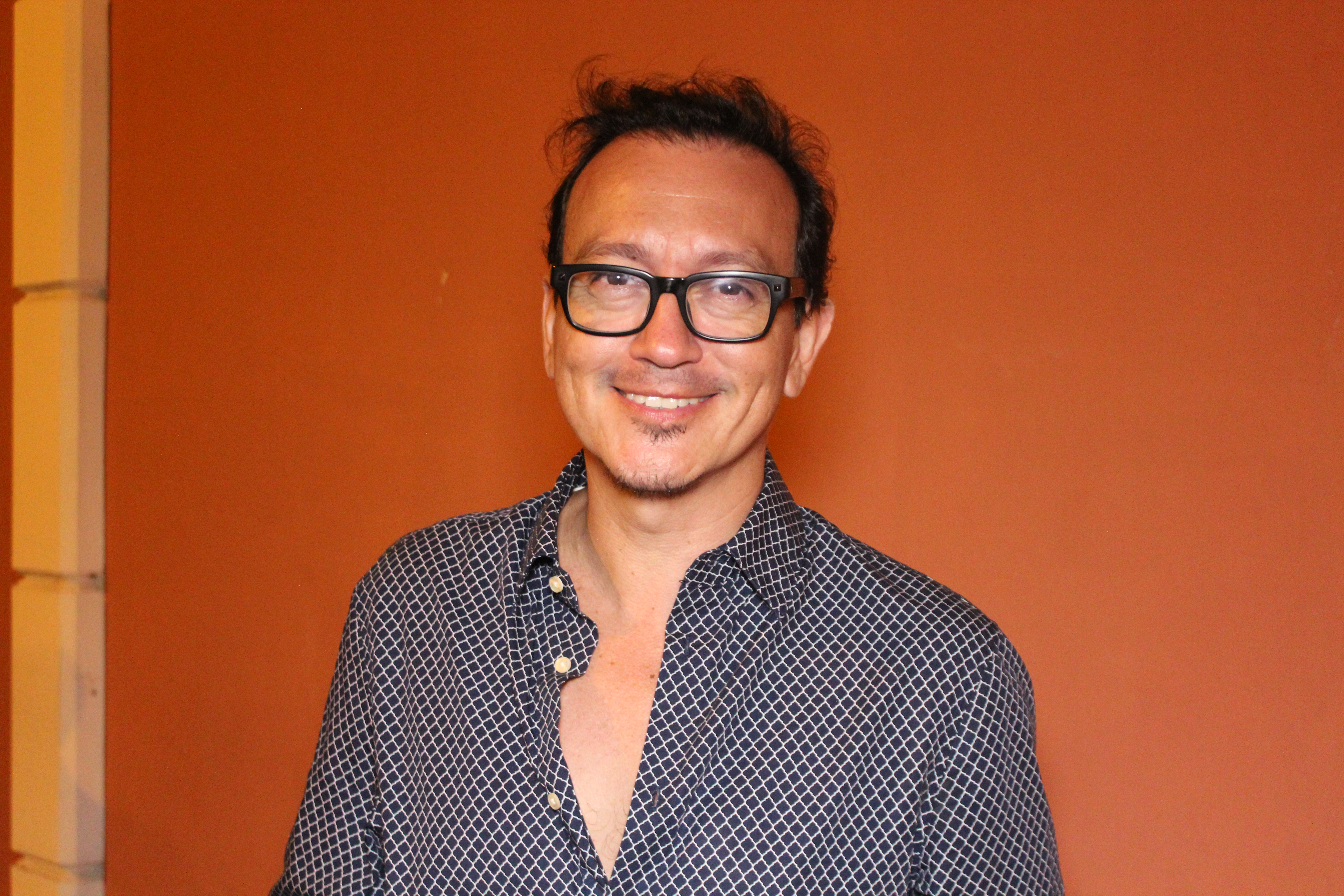 David Reinoso en 2016